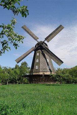 Britzer Mühle, Berlin, Germany